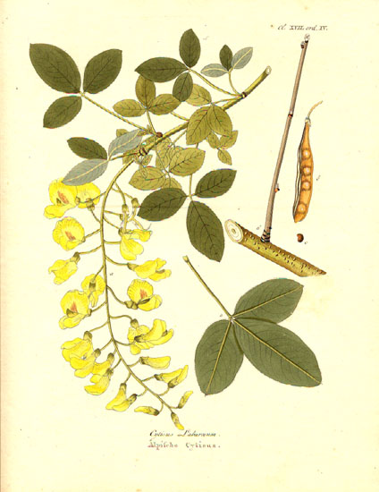 Leguminosae - Laburnum vulgare